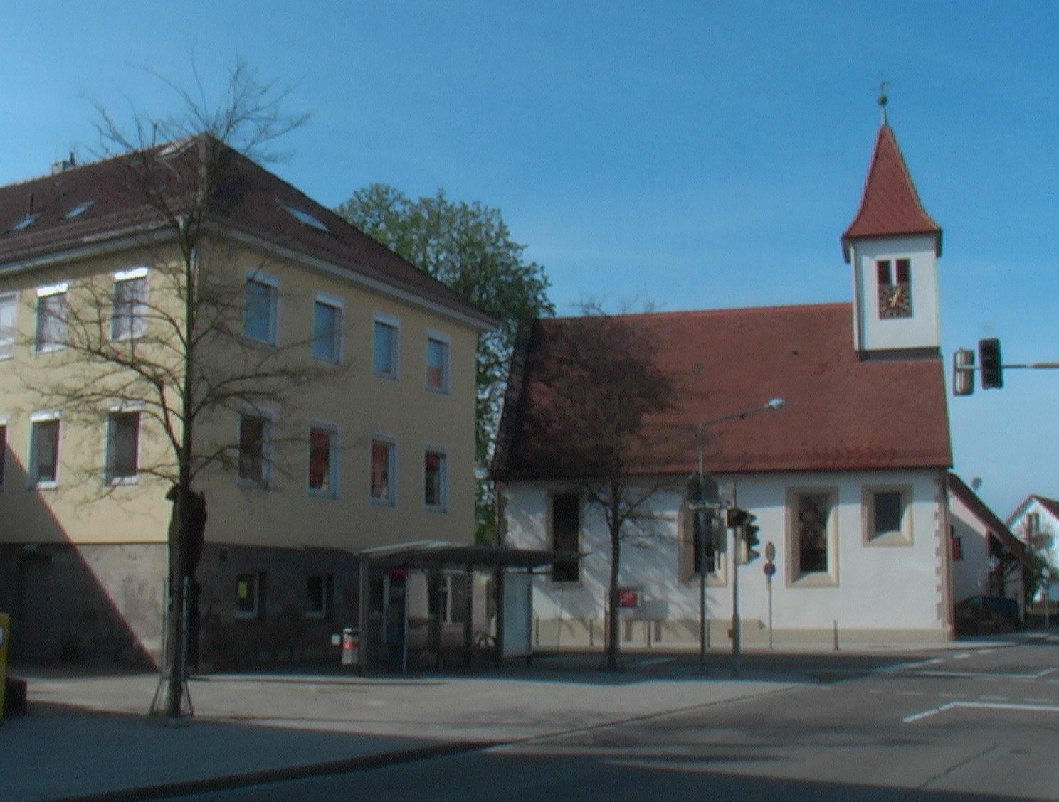 Die gotische St.Petrus-Kapelle in Degerschlacht bei Reutlingen wurde 1681 als Kirche barockisiert und im 19. Jahrhundert noch einmal verändert. Links ist das Rathaus zu erkennen.